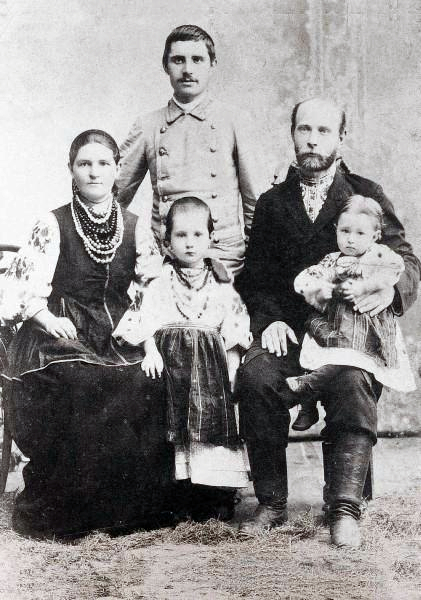 Климентій Квітка (стоїть) зі старшою сестрою та її родиною (або це сім'я Косачей), кінець 1890-х.